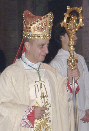 Mons. Salvatore Fisichella, Vescovo Ausiliare di Roma e Rettore della Pontificia Università Lateranense